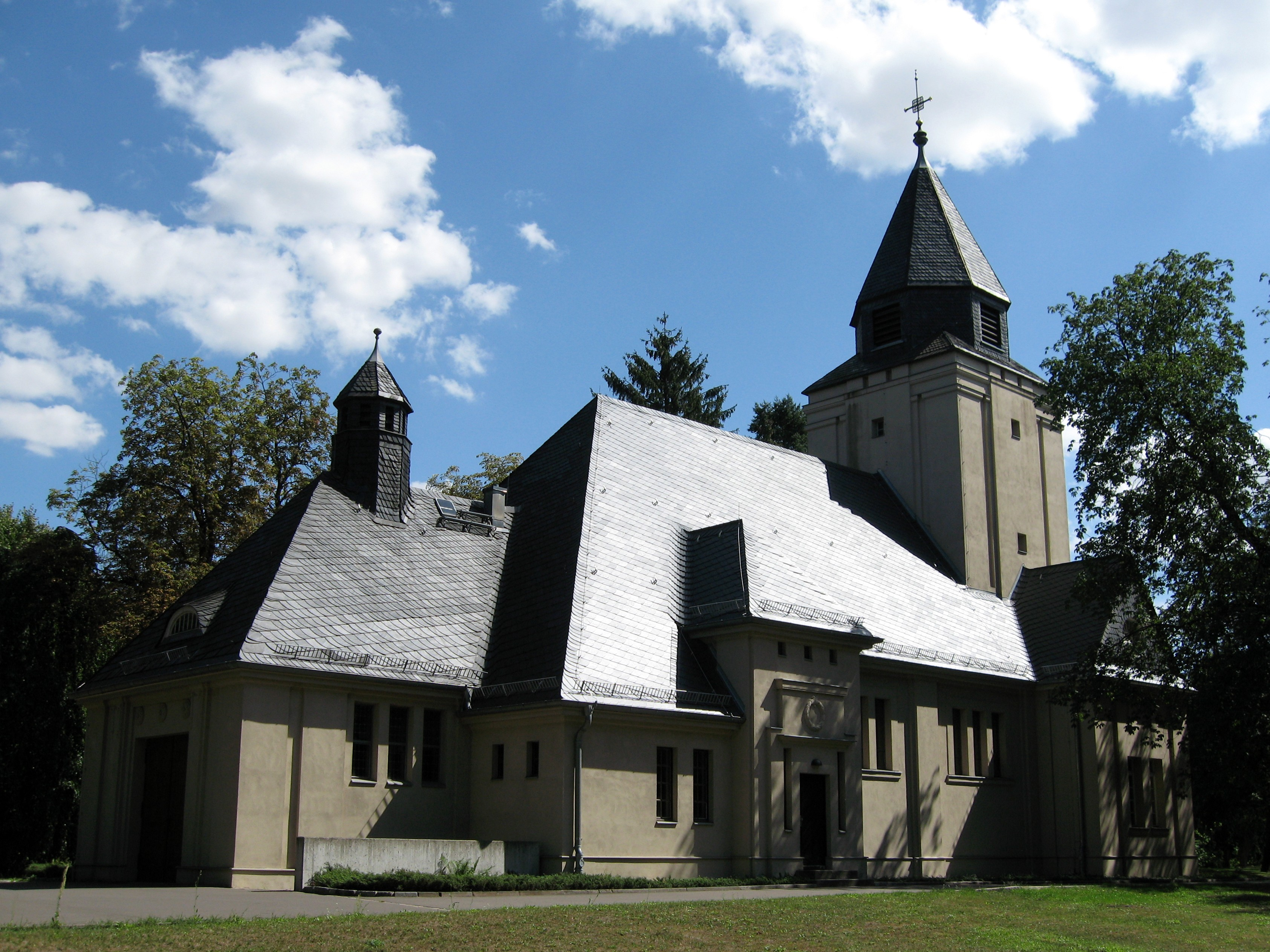 Kapelle des Ostkirchhofs Ahrensfelde, Landkreis Barnim, Land Brandenburg, Deutschland